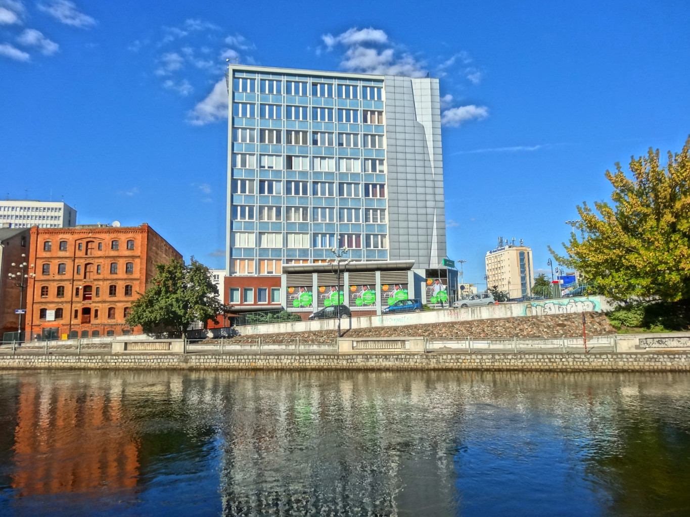 Biurowiec Projprzem S.A. na północnym nabrzeżu Brdy w Bydgoszczy